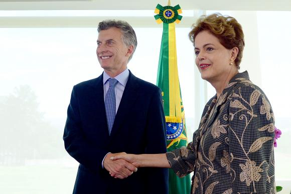 Argentine president-elect Mauricio Macri meets Brazilian president Dilma Rousef